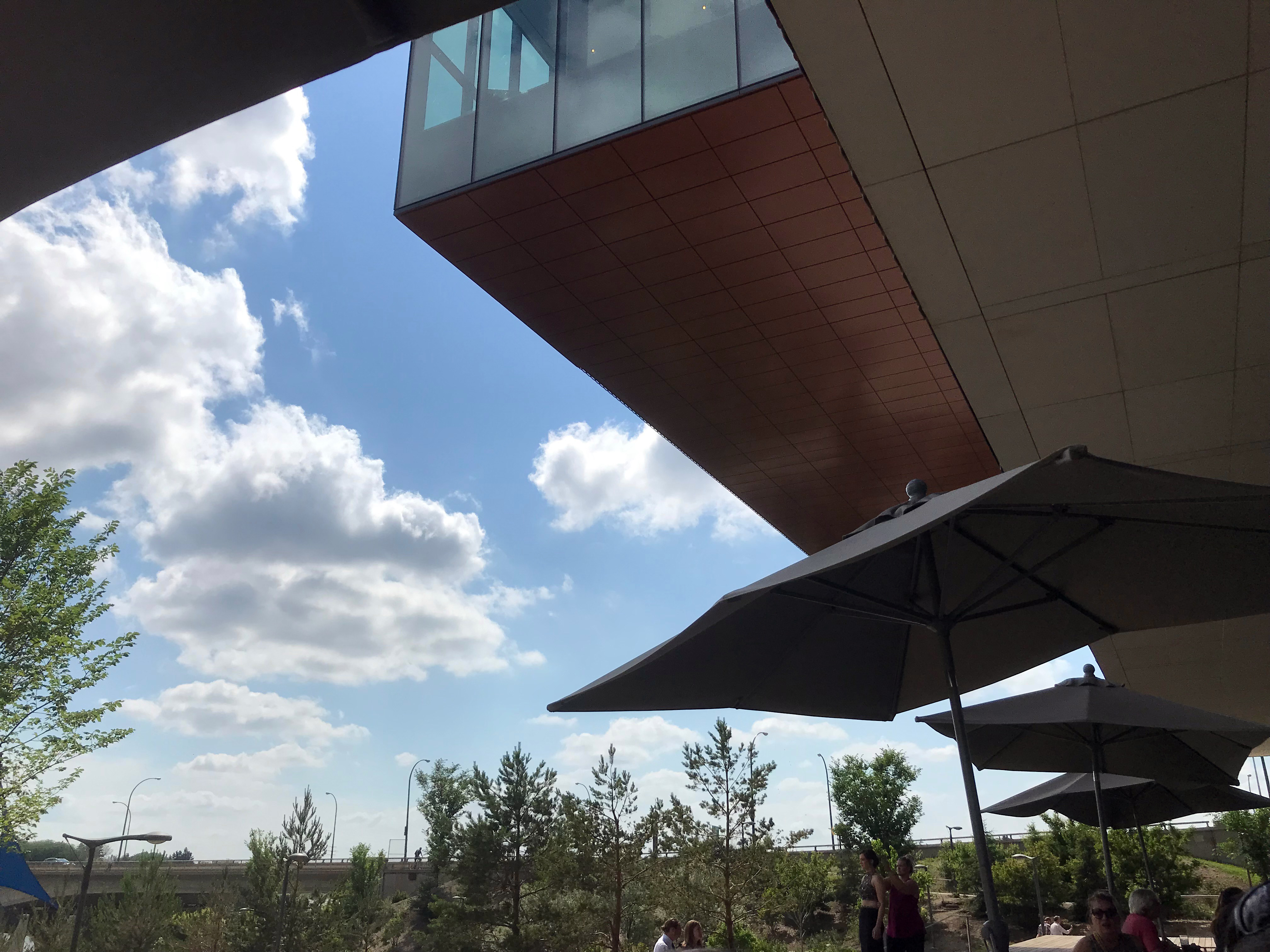 Under the Remai Modern Overhang